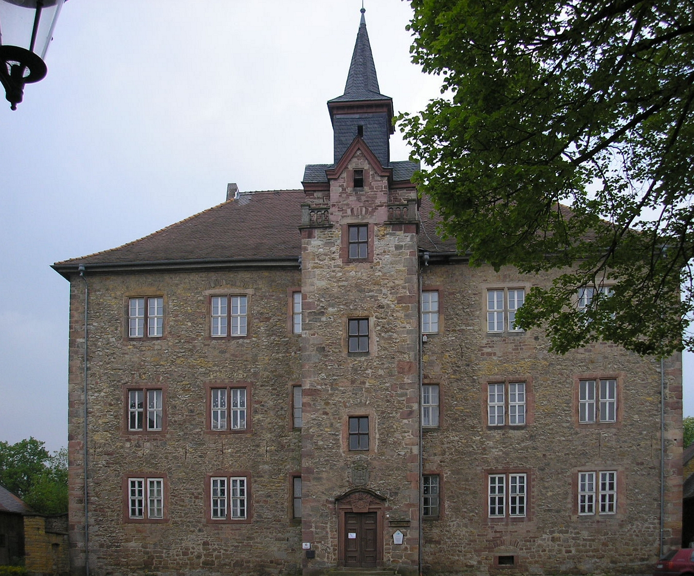 Das Amtsgerichtsgebäude in Geisa (Rhön).